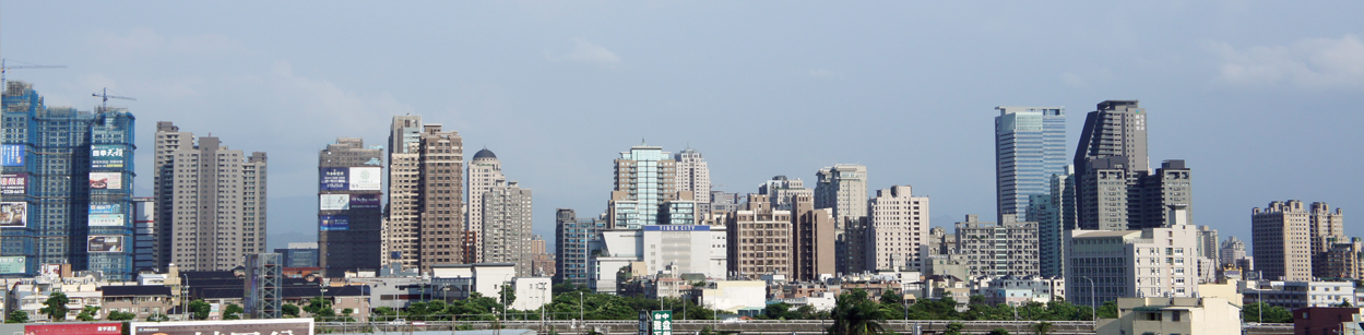 台中市七期市地重劃區天際線